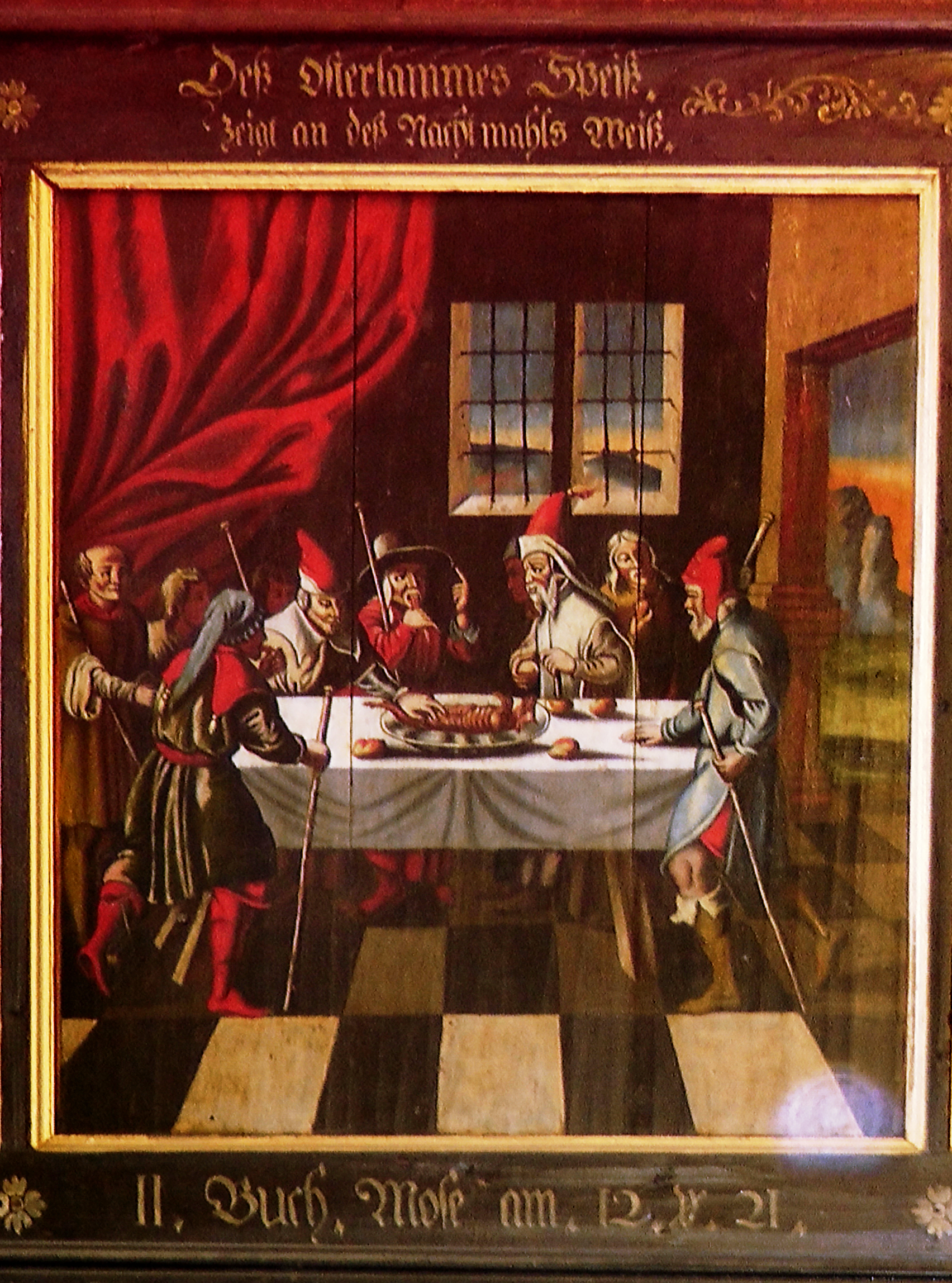 Evangelische Kirche Mülheim Mosel, Tafelbilder von Johann Georg Engisch. Das Passamahl